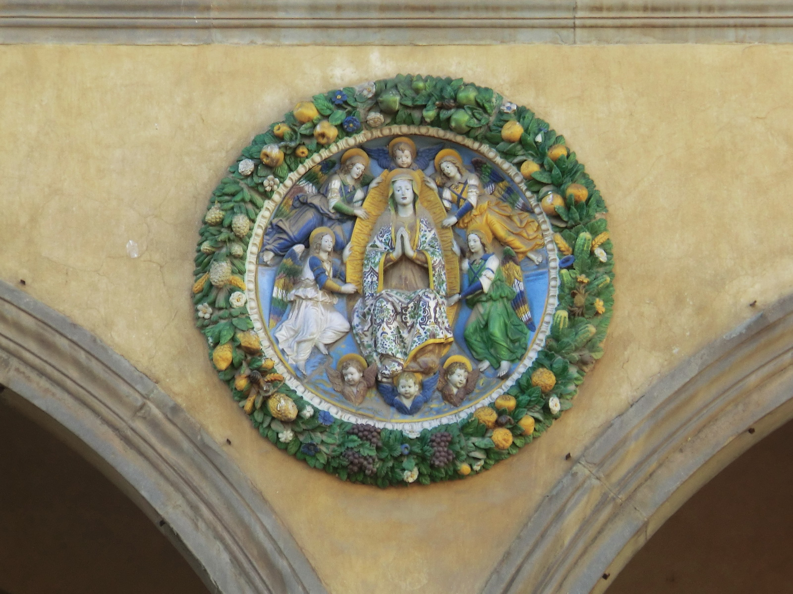 Ospedale del Ceppo, Pistoia, Italy